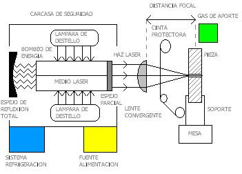 equipo de mecanizado con laser, con paint